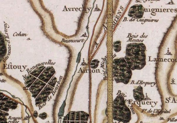 Carte de Cassini de la commune d'Airion.